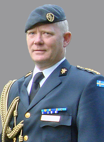 Överste Tommy Karlsson, Chef Göta ingenjörregemente.